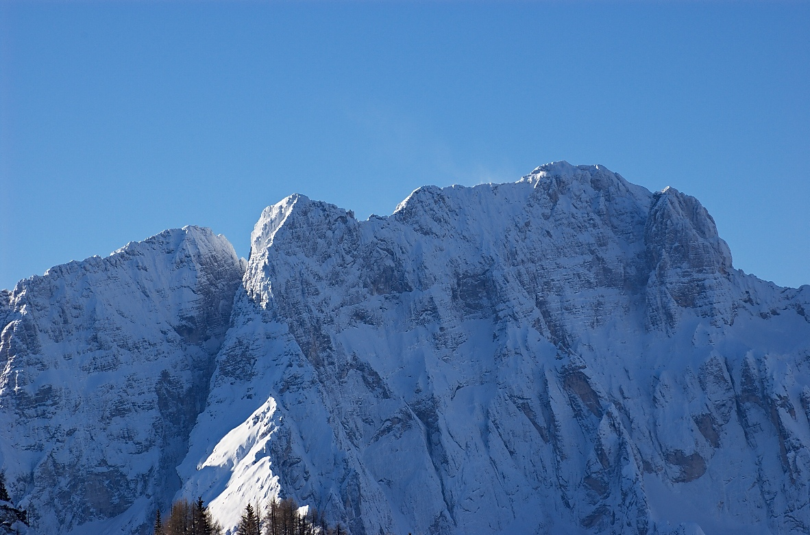 Jof di Montasio